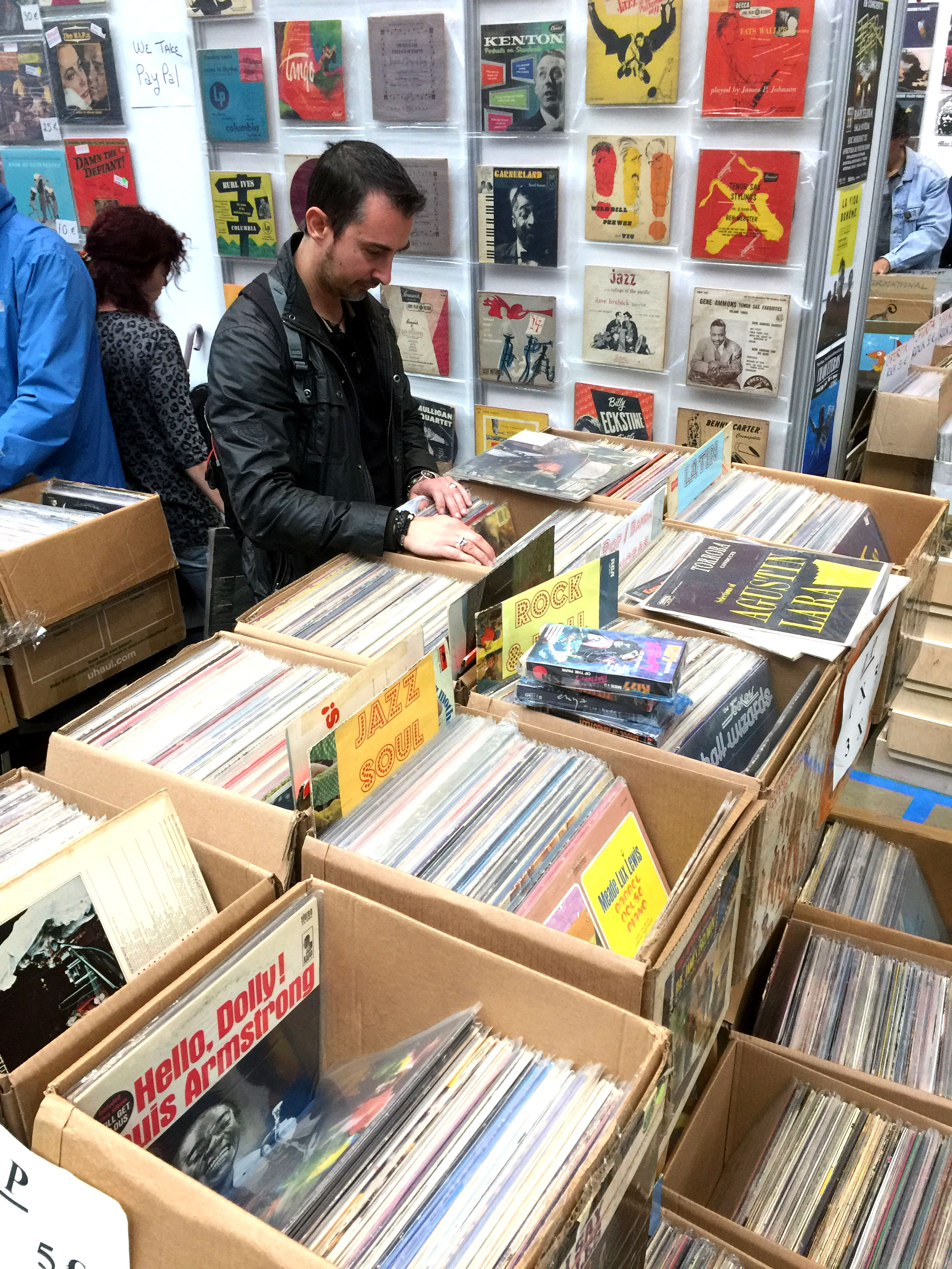 Imágenes captadas durante la Feria del Coleccionista Discográfico realizada en Barcelona el 30 de Abril y el 1 de Mayo de 2016